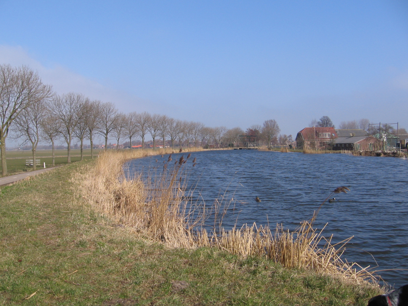 Zoeterwoude and surroundings